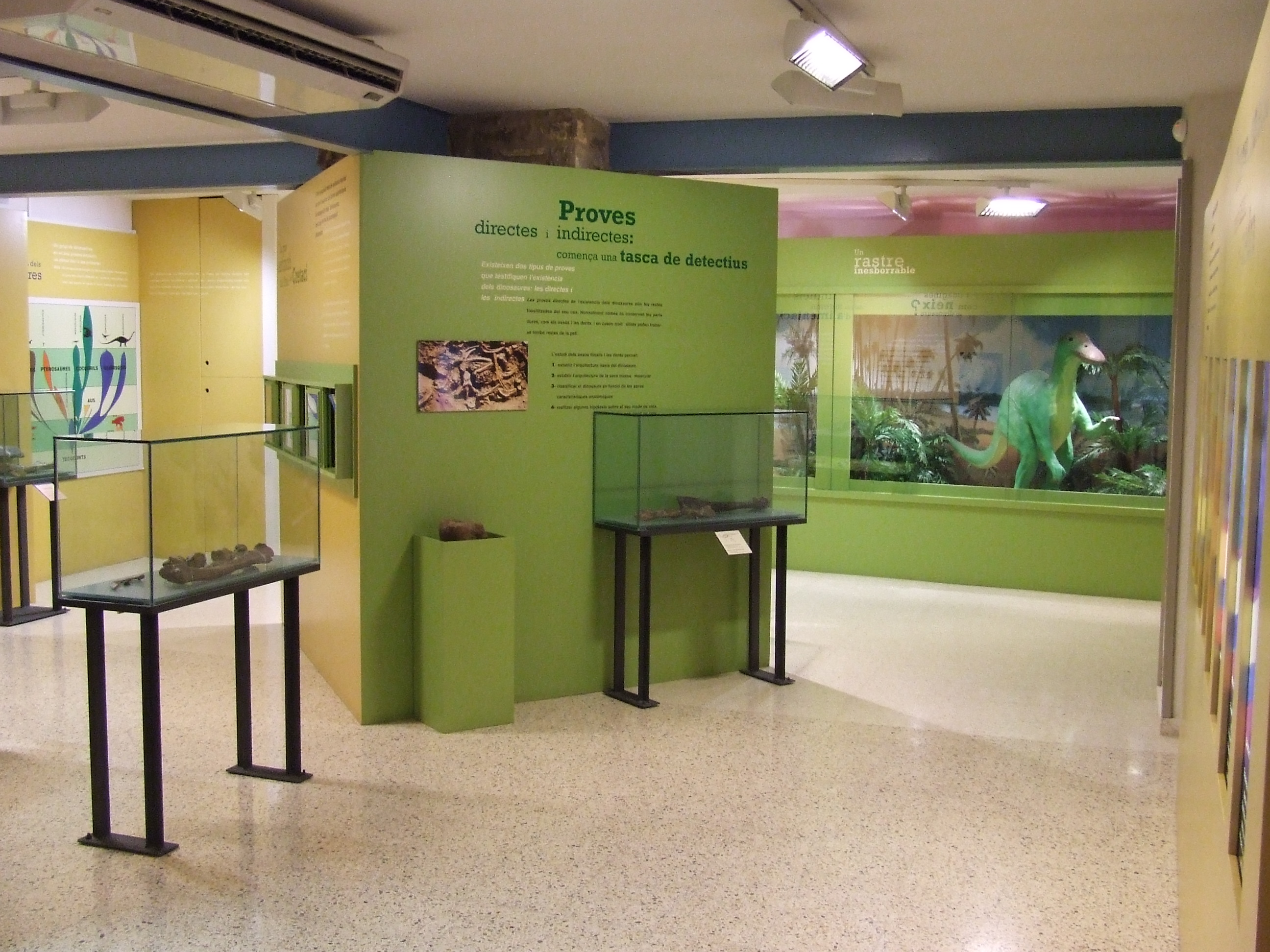 Museu de Conca Dellà (Isona, Pallars Jussà)